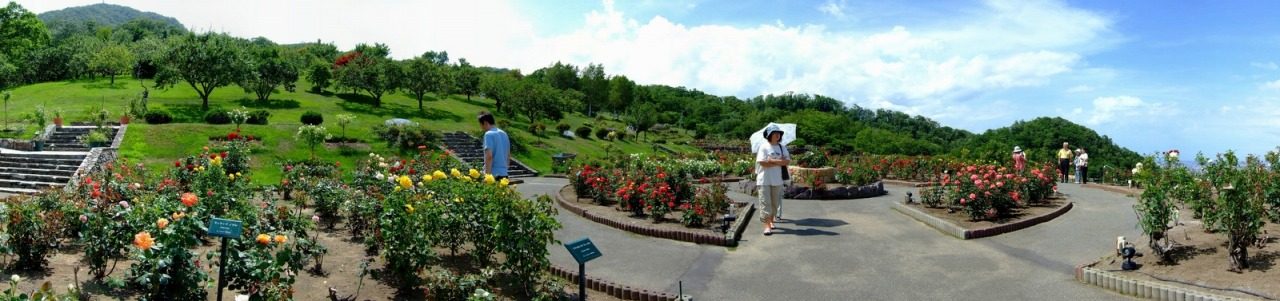 Chizaki rose garden